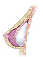 1 English - Breast after subglandular augmentation Español - Pecho después de un aumento subglandular 2 English - Breast after submuscular augmentation Español - Pecho después de un aumento submuscular